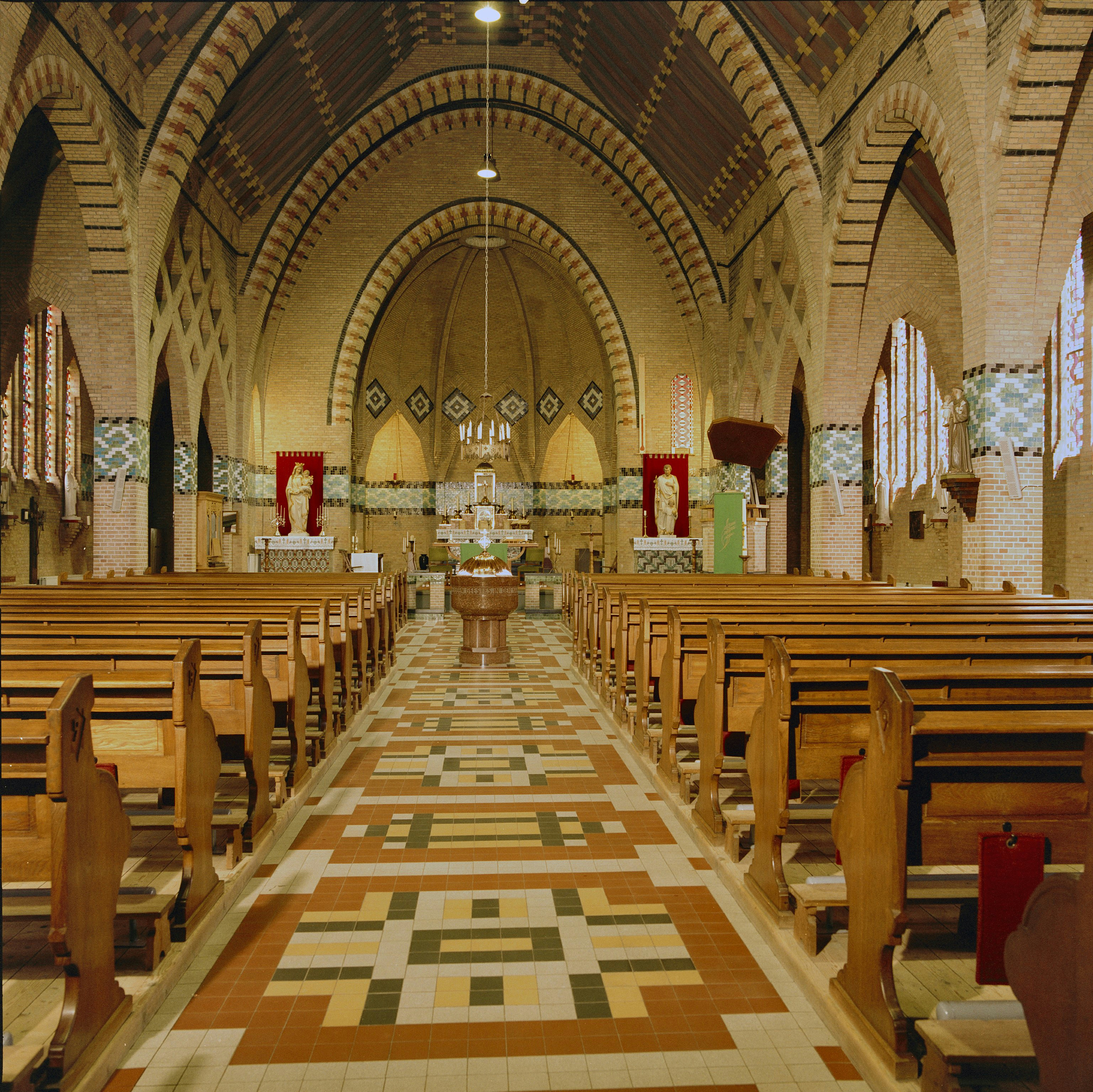 ROOMS-KATHOLIEKE KERK (MARIAKERK): INTERIEUR, NAAR HET OOSTEN